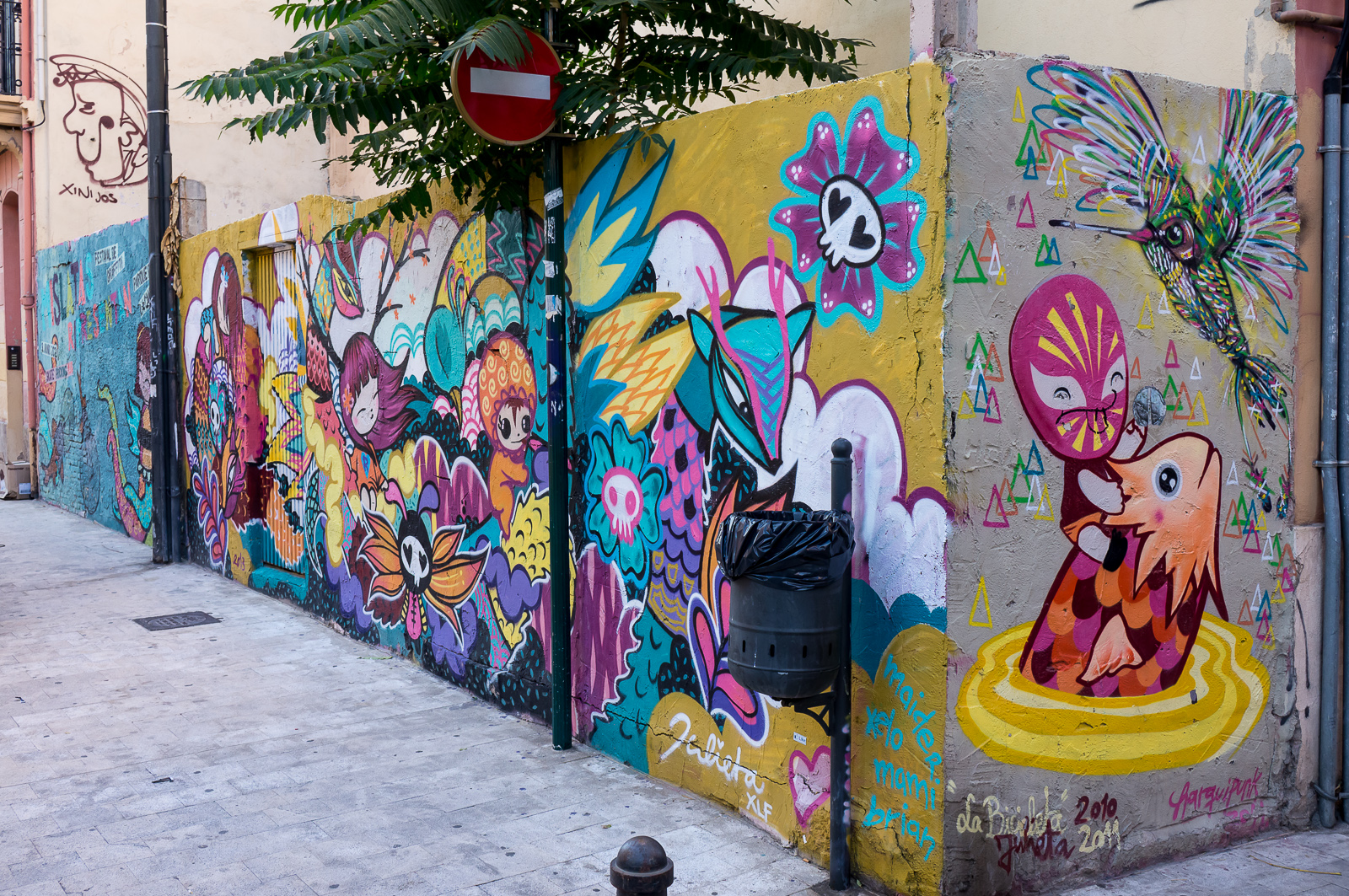 Julieta - 32